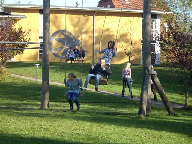 Billede fra gyngerne på Efterskolen Ådalen med salen i baggrunden